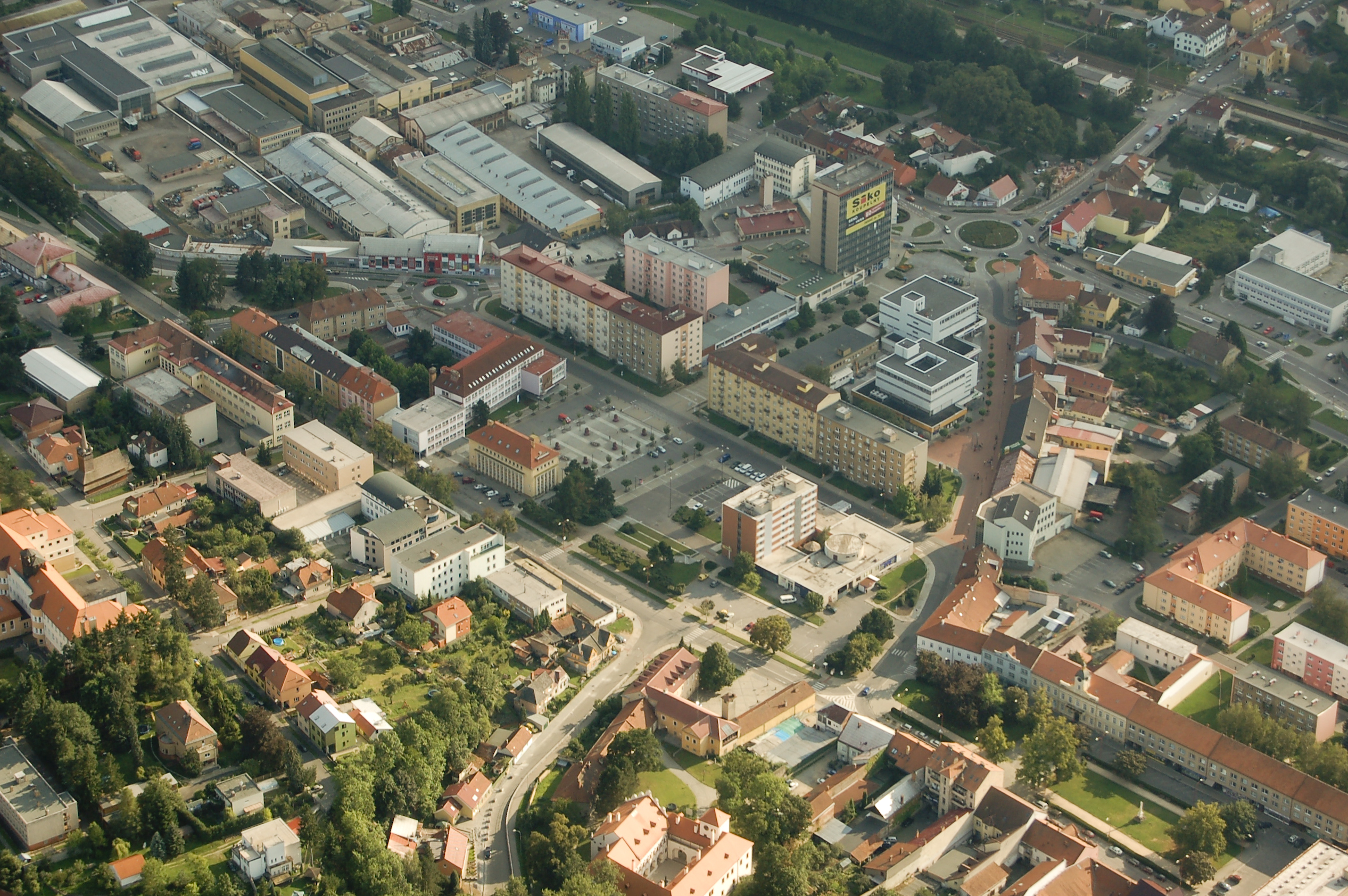 Letecký snímek centra Blanska